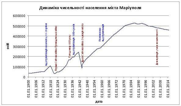 рост населения Мариуполя в ХХ веке